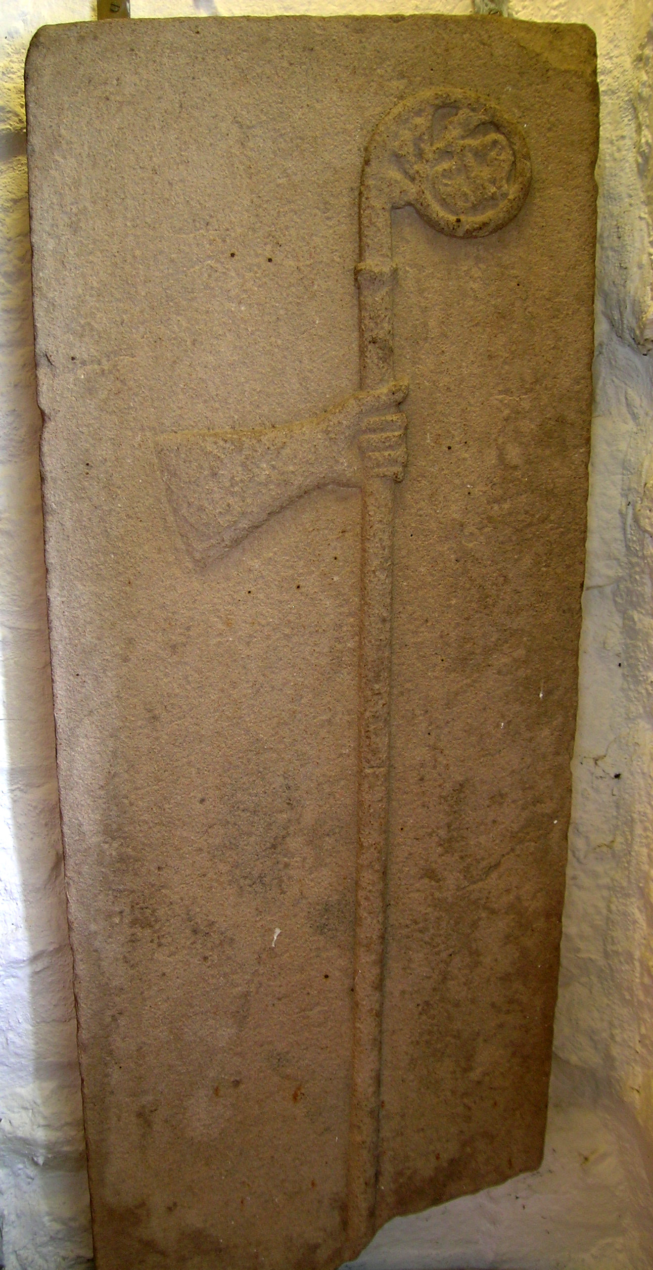 Lápida de un Abad de principios del siglo XIII en la Abadía cisterciense de Boyle (Irlanda). La imagen del brazo y el báculo son típicos cistercienses.